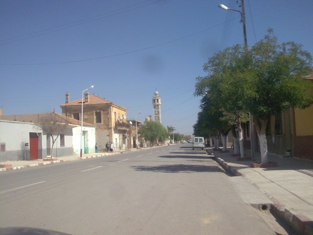 boulevard